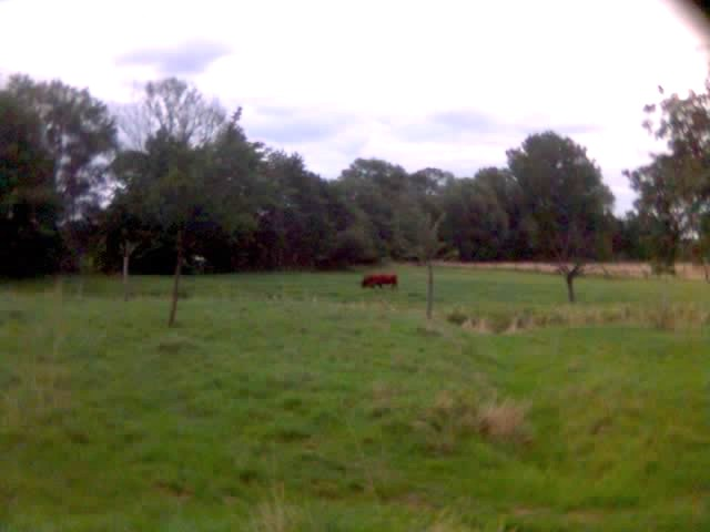 Das Bild zeigt das Feld, auf dem sich die alte Lindauer Burg Luftbildern zufolge befunden haben könnte.